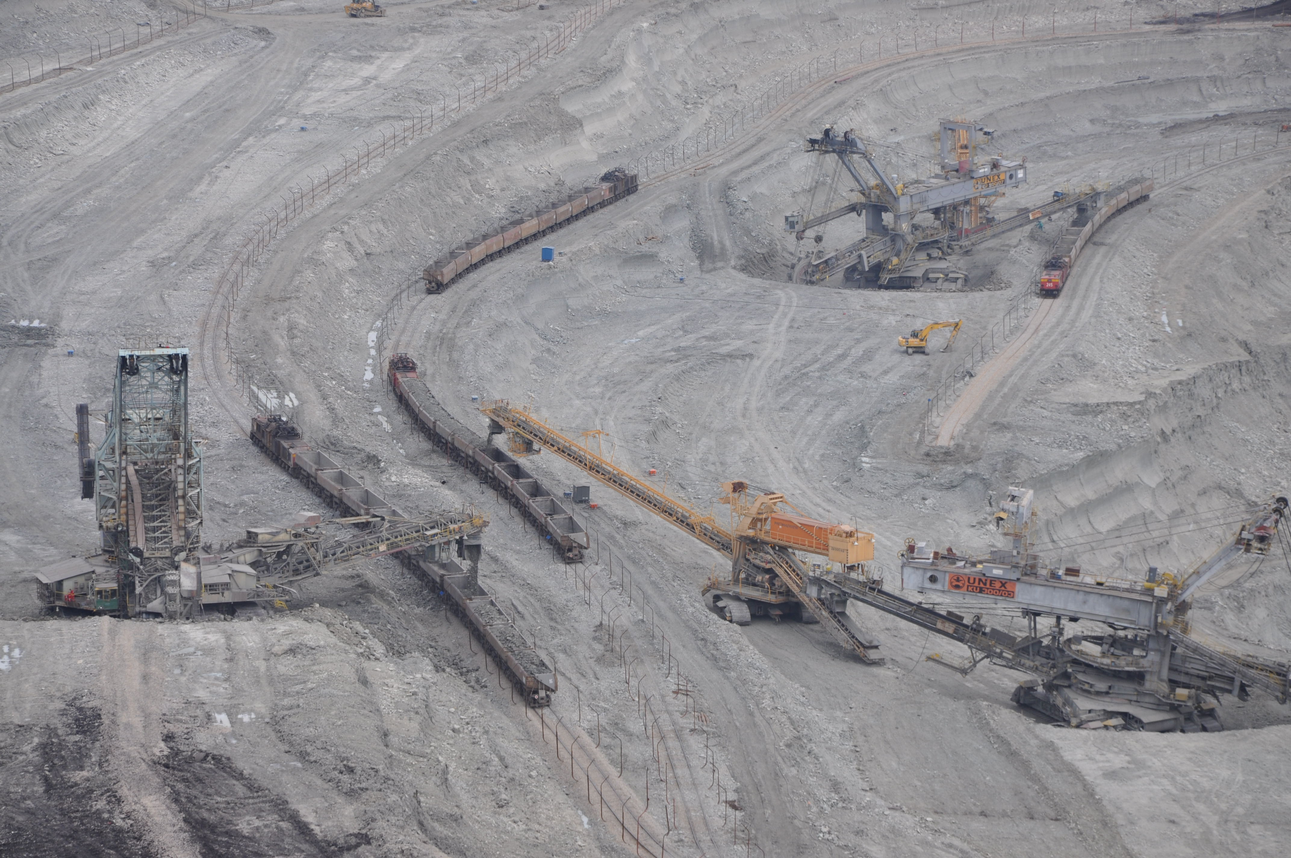 Lom Družba